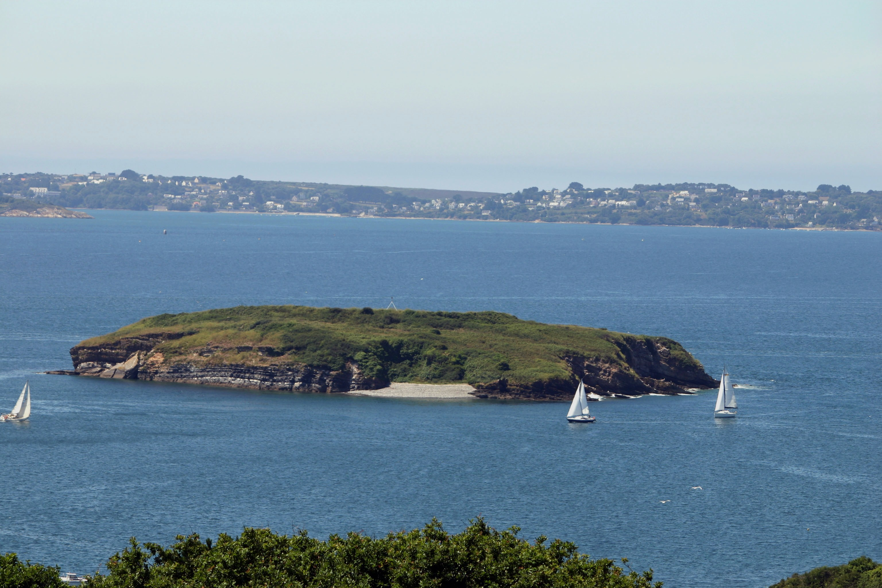 l'ïle Ronde vue de la Pointe de l'Armorique-Plougastel-Daoulas- Finistère-Bretagne -France